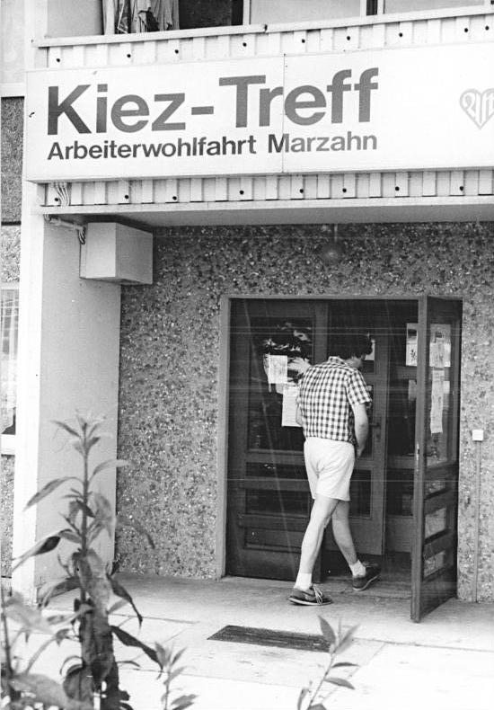 ADN-ZB-Grimm-13.7.90-wü Berlin: Kiez-Treff - Als generationsübergreifende sozialpädagogische Einrichtung versteht sich der "Kiez-Treff" in der Schwarzwurzelstraße 60 in Marzahn, der von der Arbeiterwohlfahrt des Stadtbezirks getragen wird. Am "Tag der offenen Tür" am 16.7. ab 14.00 Uhr können die Bürger von ihrem Treff Besitz ergreifen.